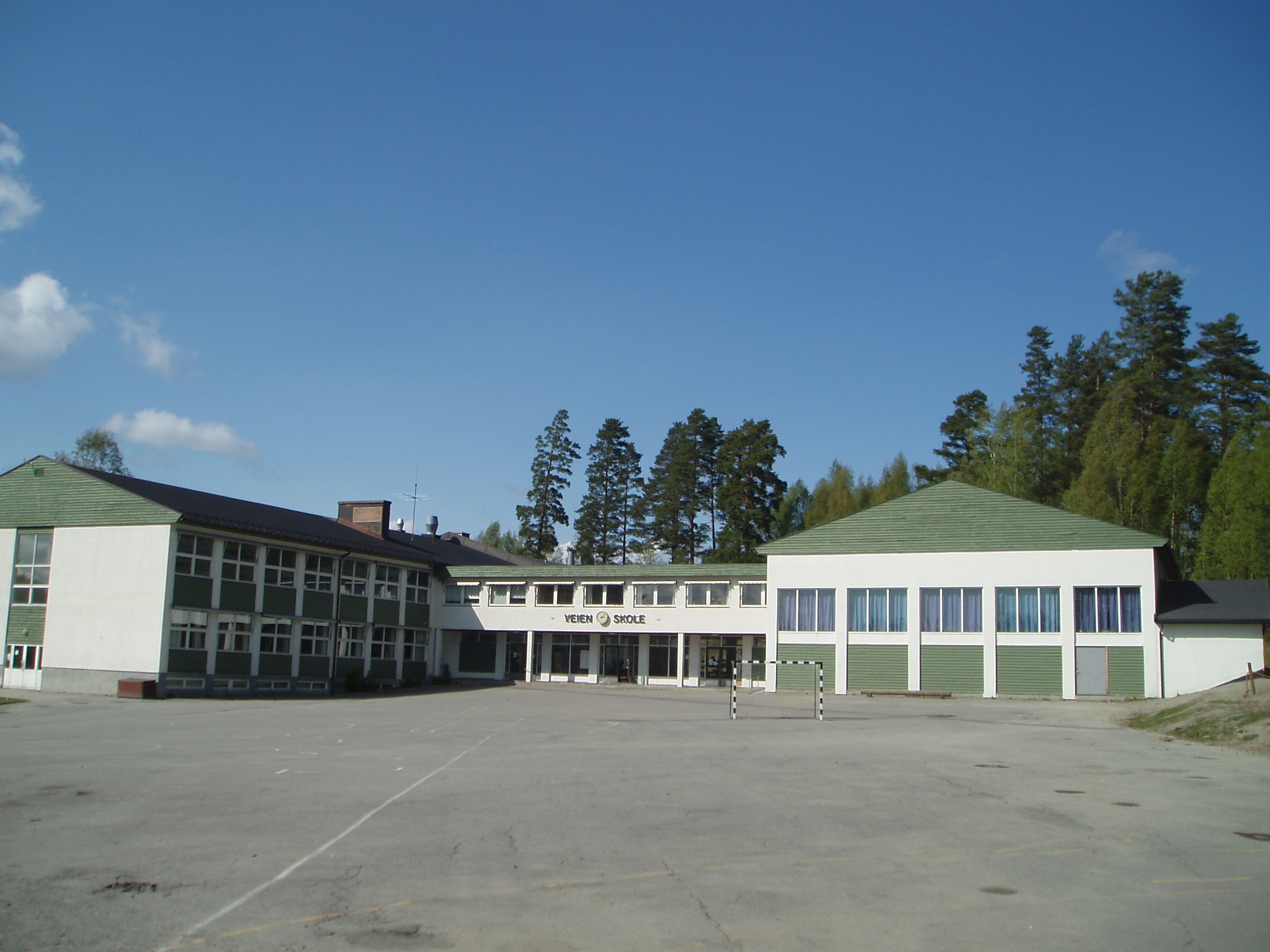 Veien barneskole i Ringerike kommune i Buskerud fylke i Norge.